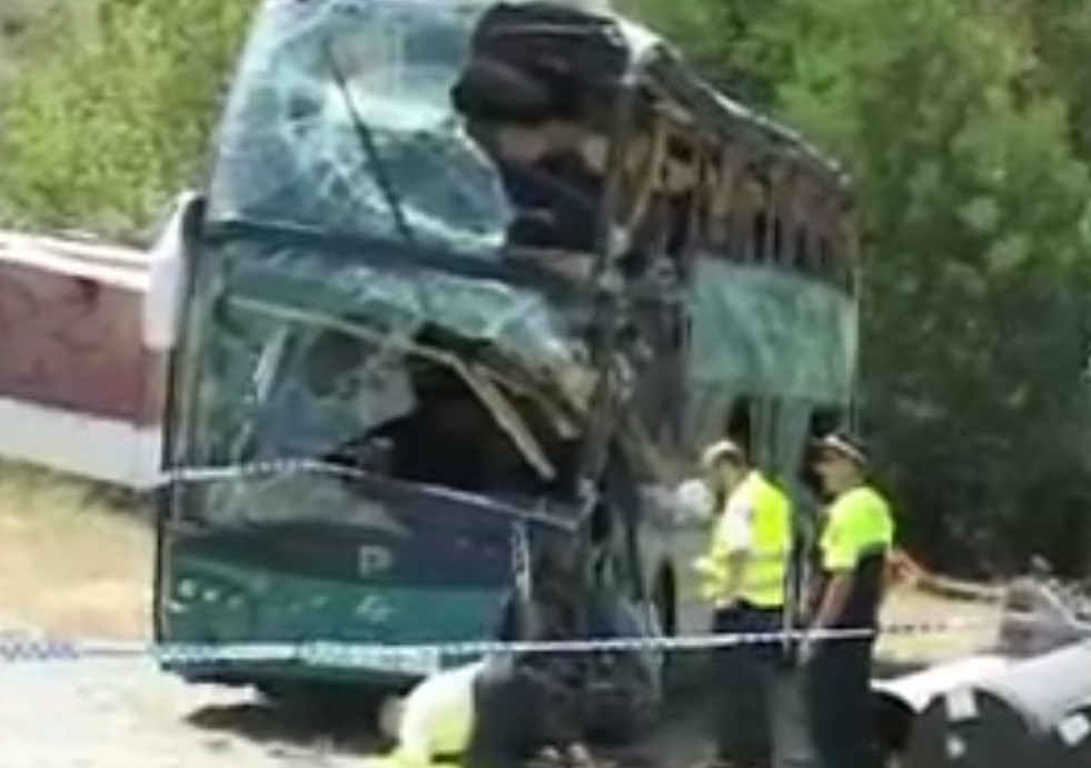 buswrak